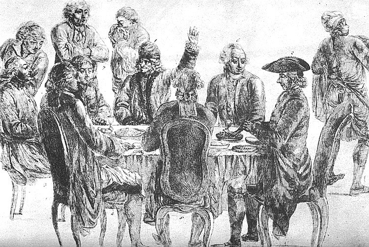 Le Souper des philosophes de Jean Huber, eau-forte sur papier bleu, XVIIIe siècle, Bibliothèque nationale de France. (25 x 34 cm) BNF, Estampes, N2-Voltaire La scène se passe à Ferney (et non au café Procope comme indiqué sur la photo). Imaginée par Huber, elle rassemble autour de Voltaire d'Alembert, Condorcet, Diderot, La Harpe, le père Adam et l'abbé Maury.